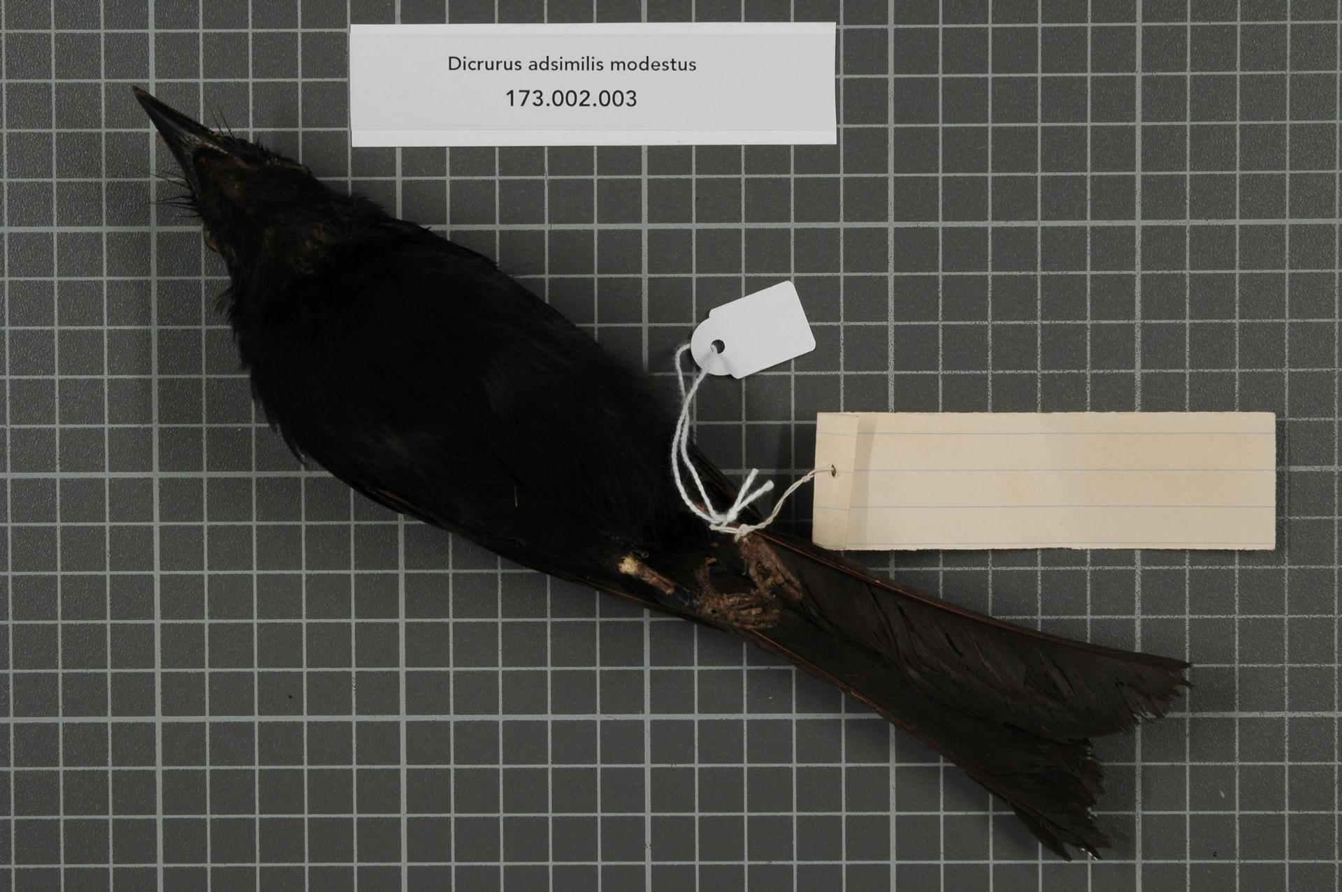 Dicrurus adsimilis modestus Hartlaub, 1849